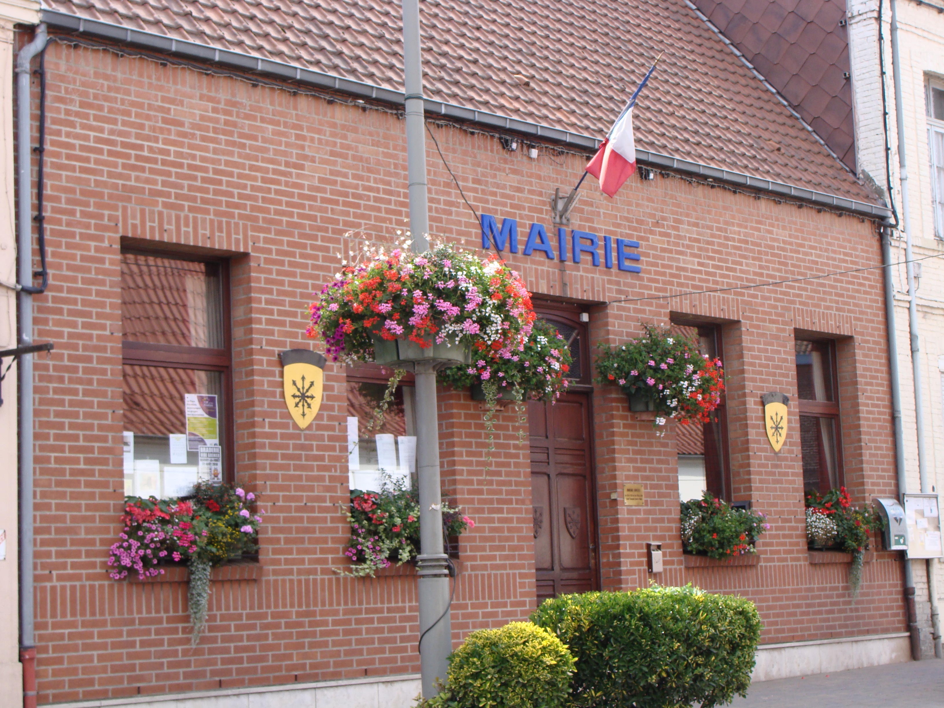 Mairie de Beuvry-la-Forêt département du Nord France